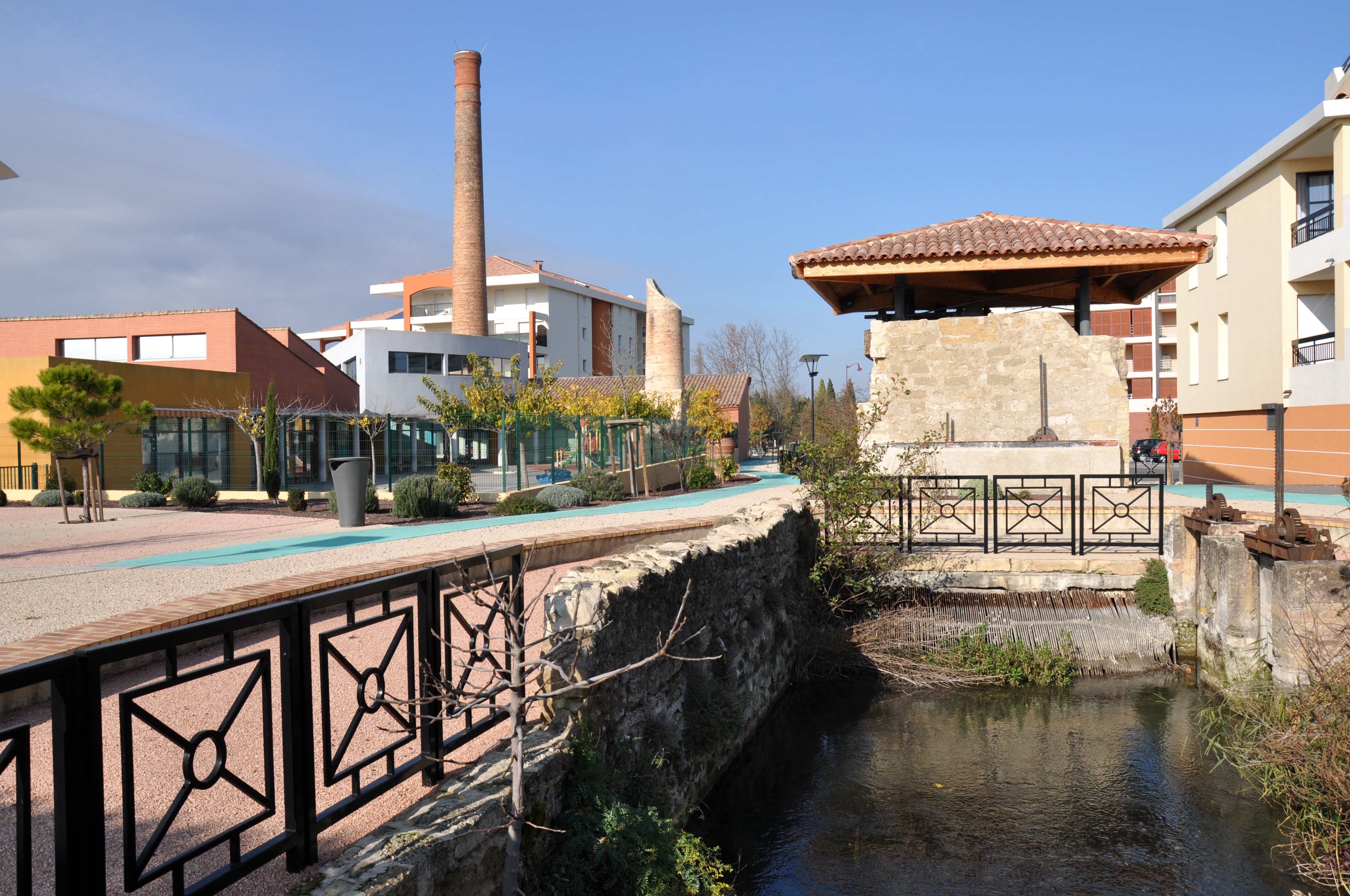 Entraigues sur la Sorgue ancien quartier Moulin des Toiles